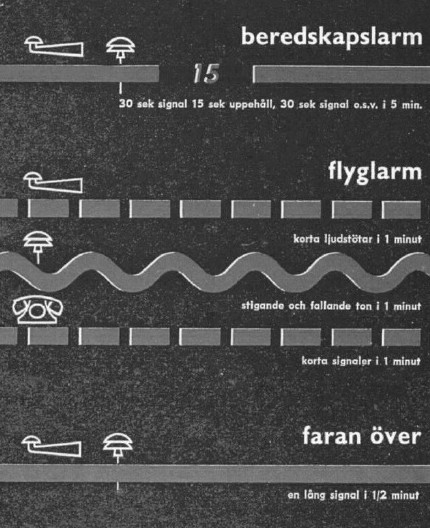 Schema över svenskt beredskapslarm, flyglarm, med mera. Notera att bilden inte ger en korrekt beskrivning av de signaler som används idag, och därför inte kan användas i artiklar för att illustrera sådana.